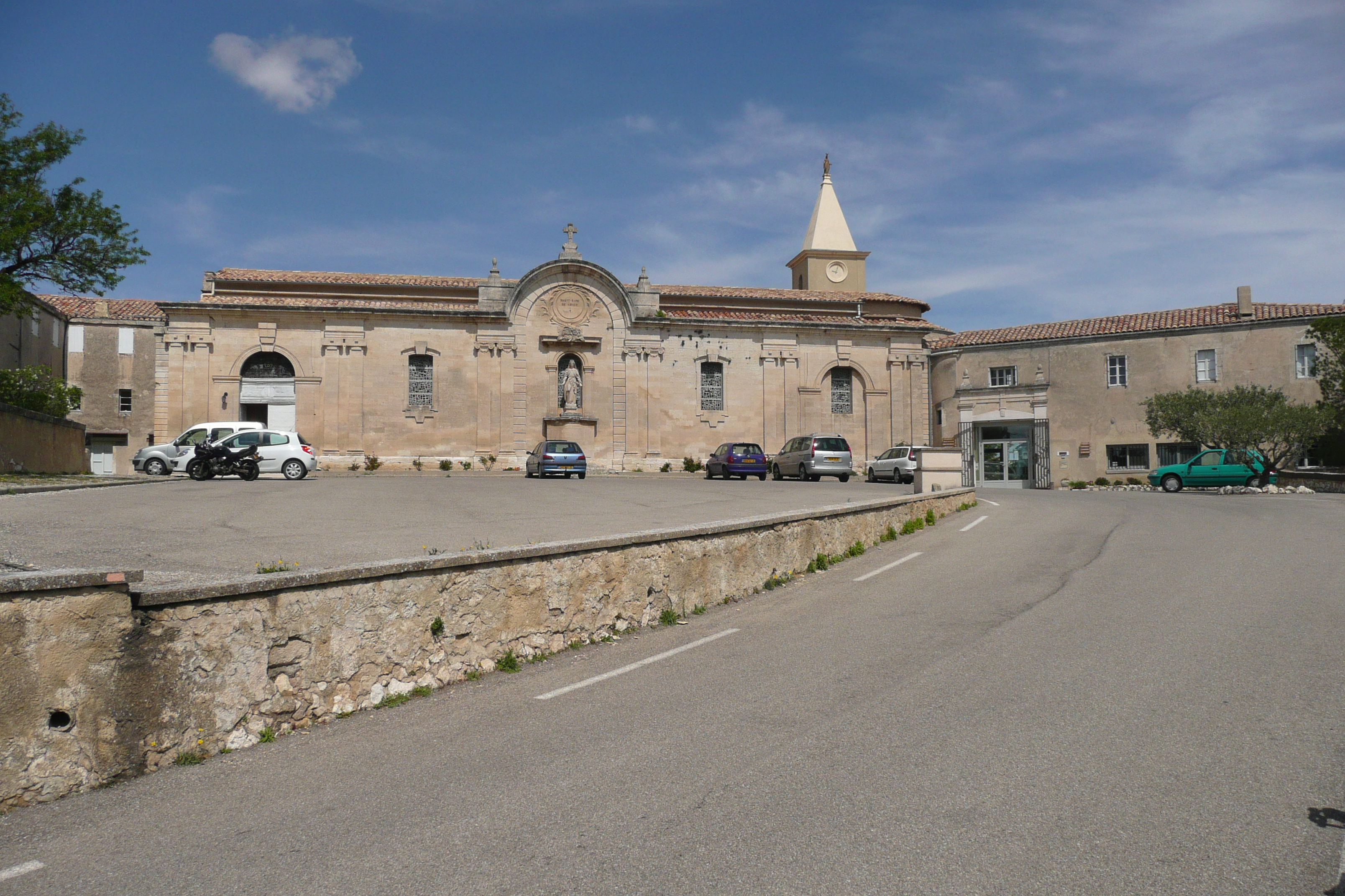 Notre Dame de Grâce près de Rochefort-du-Gard.